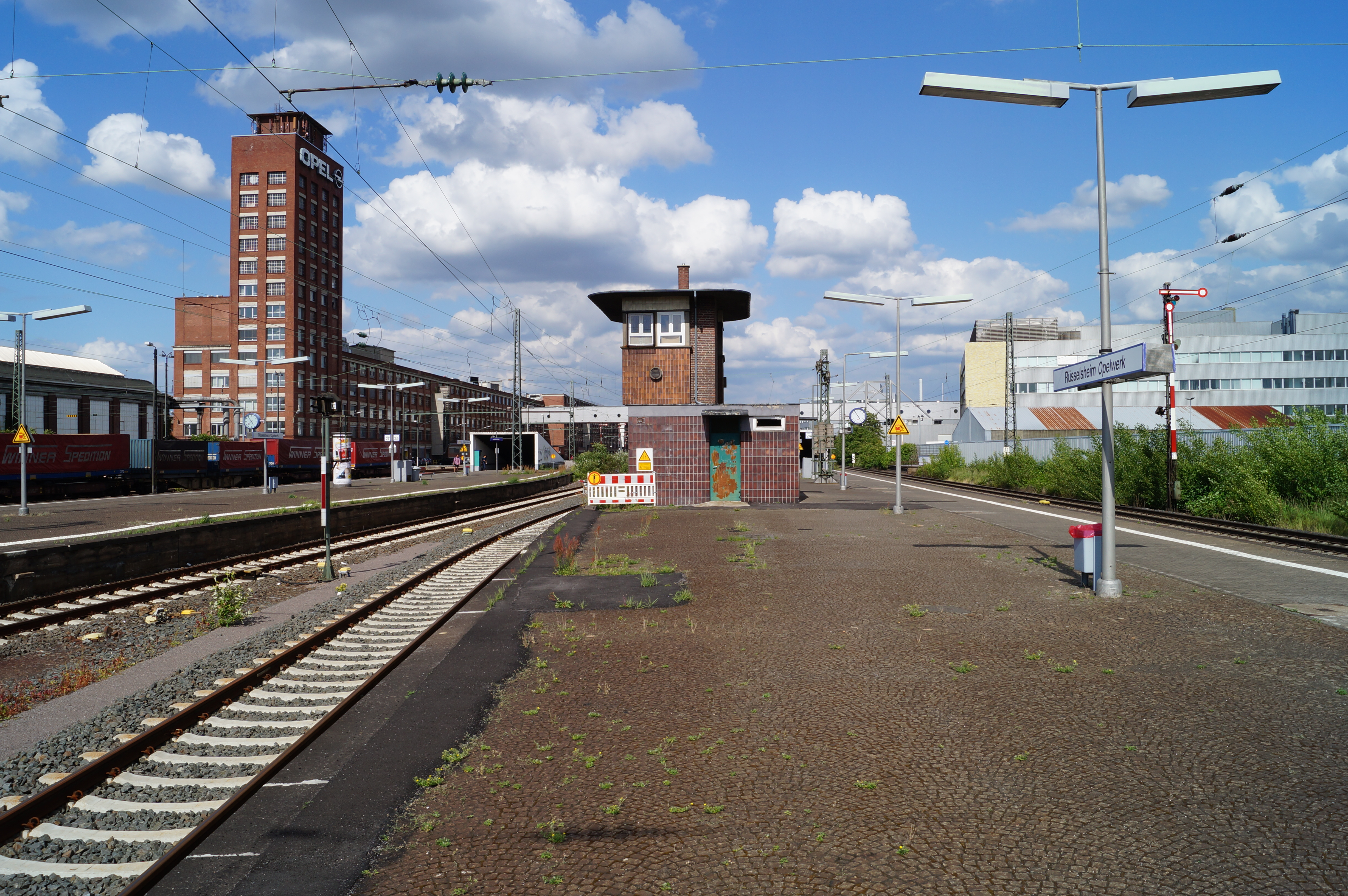 Die Bahnsteige des Bahnhofs Rüsselsheim Opelwerk